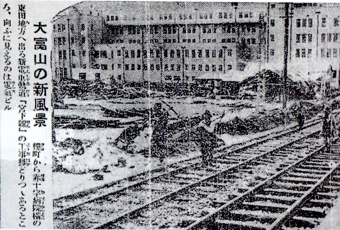 宮下線工事中の記事（『富山日報』1936年（昭和11年）3月24日）